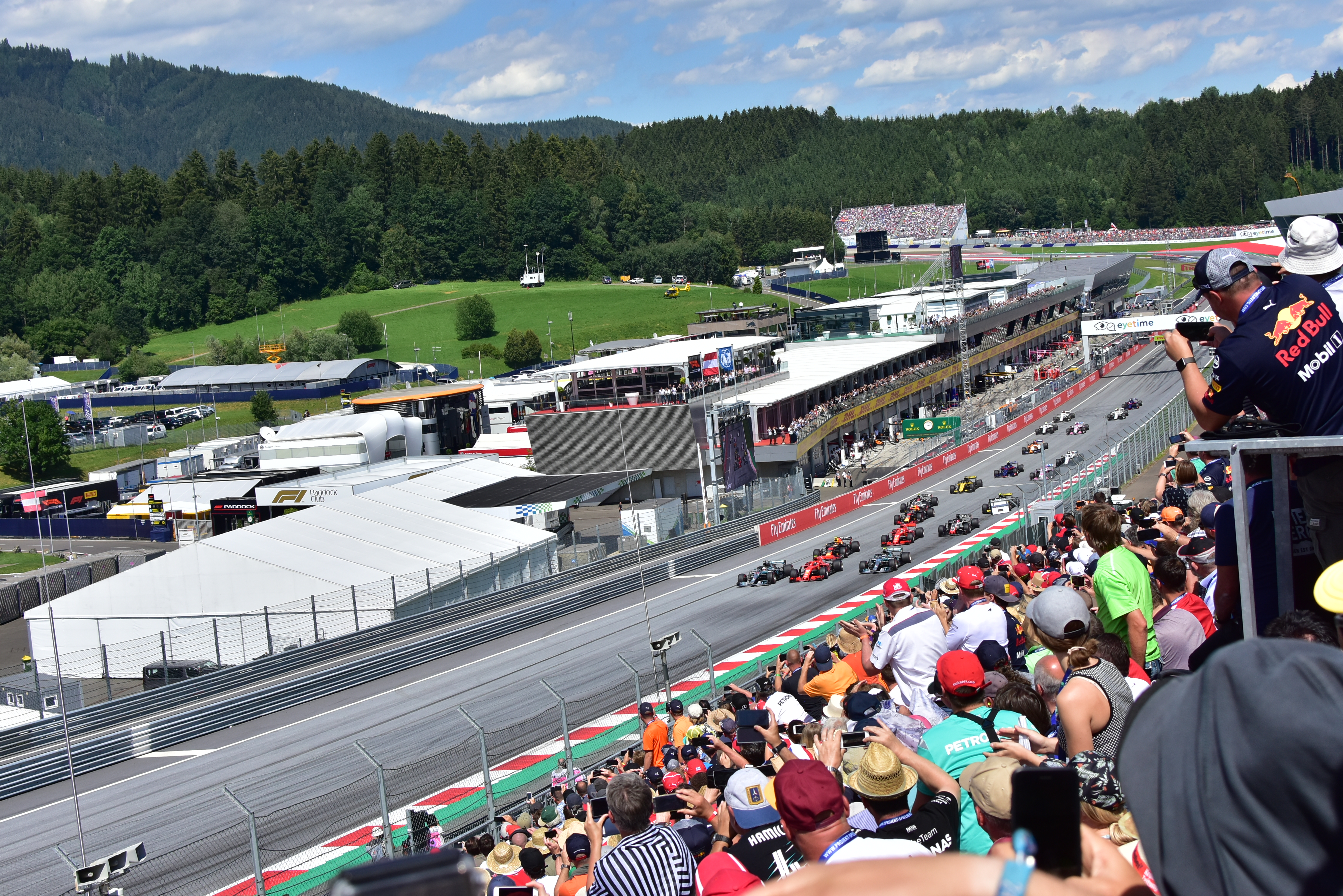 2018 Austrian Grand Prix.